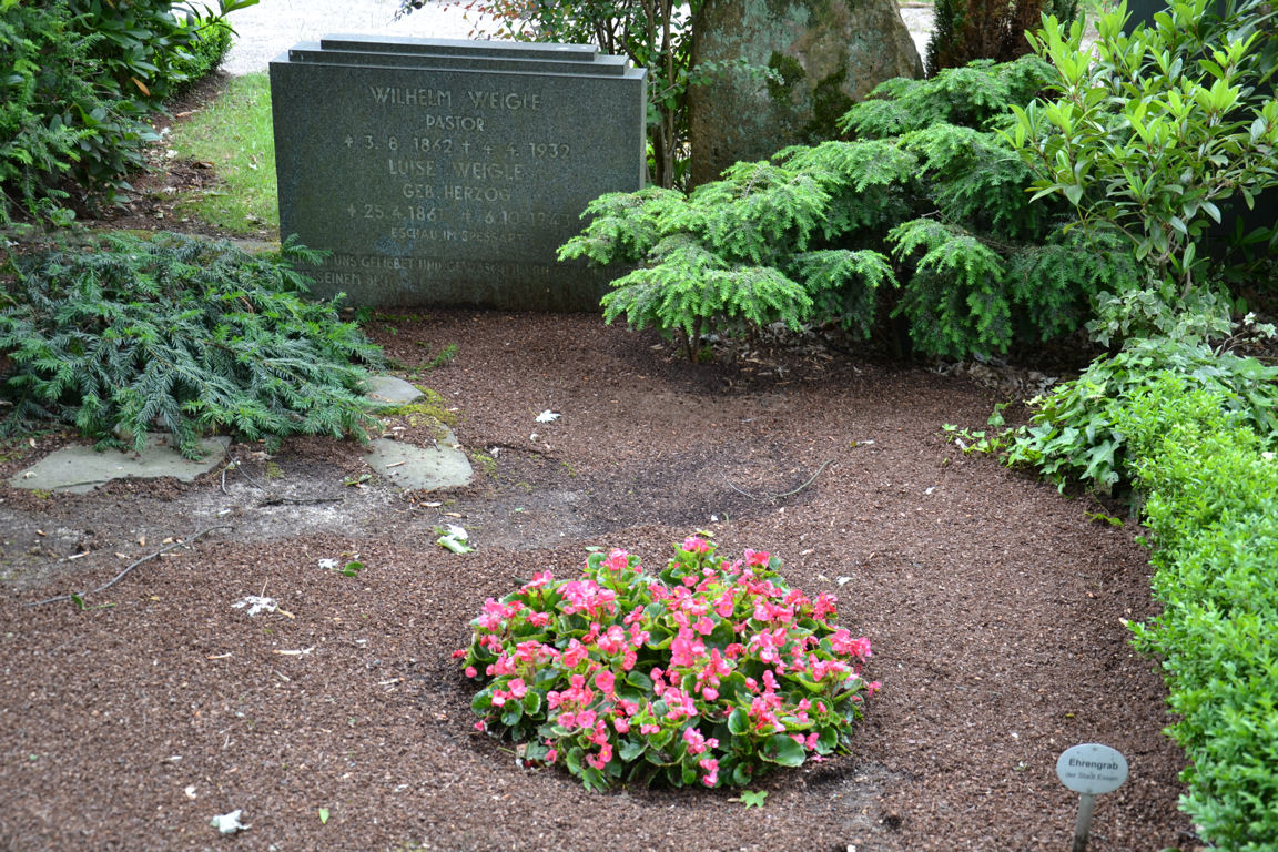 Wilhelm Weigle, Gründer des Essener ev. Weiglehauses - Ehrengrab der Stadt Essen auf dem Ostfriedhof